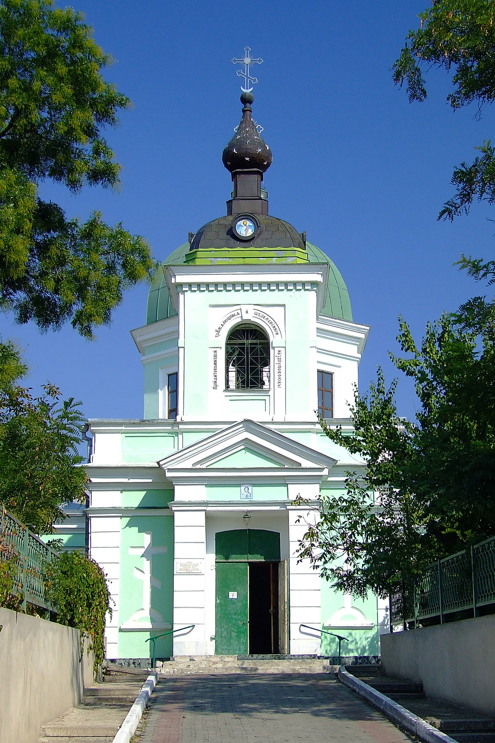 Всіхсвятська церква (мур.), Херсон, Пугачова вул., 1